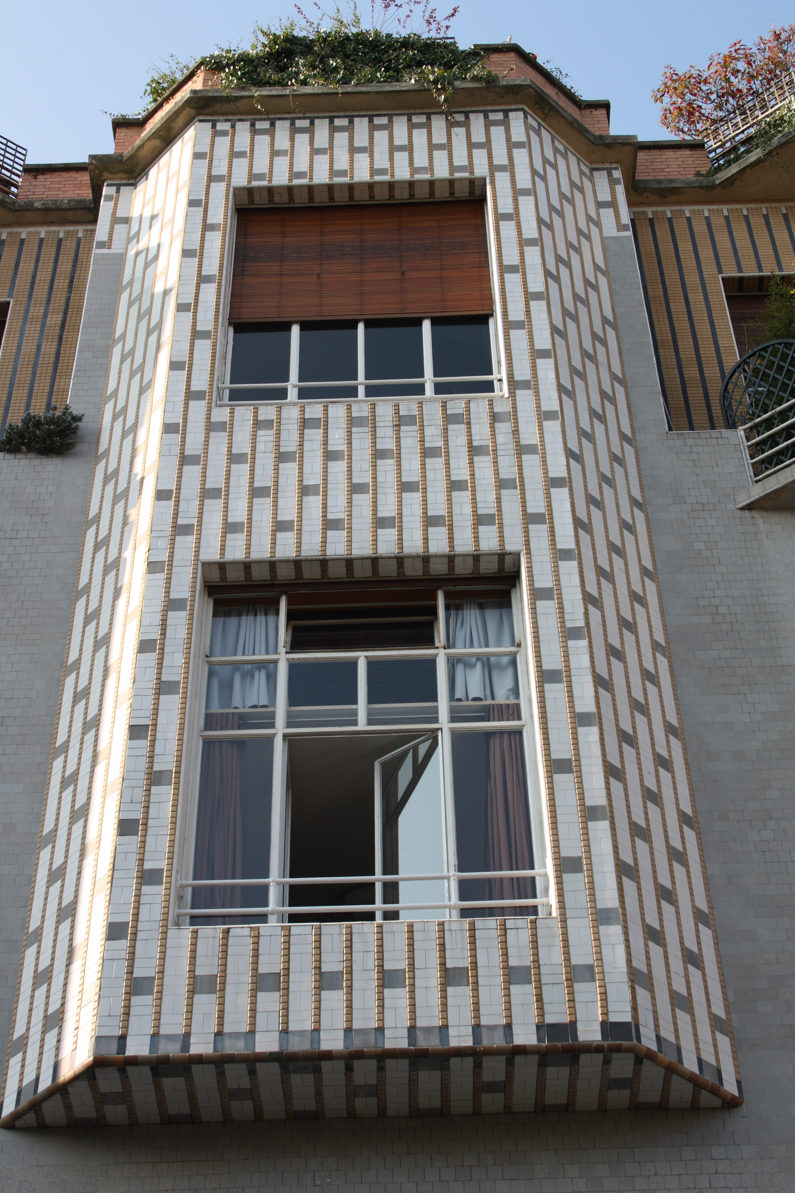 Wohnhaus 21, rue des Perchamps in Paris (16. Arrondissement), Architekt: Henri Sauvage